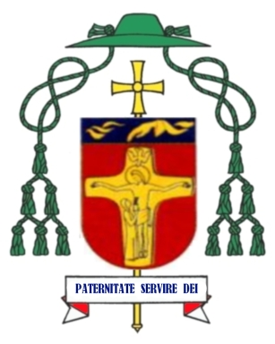 Wappen Teofil Wilski *1935 Titularbischof von Castellum in Mauretania und Weihbischof in Kalisz (seit 1995)